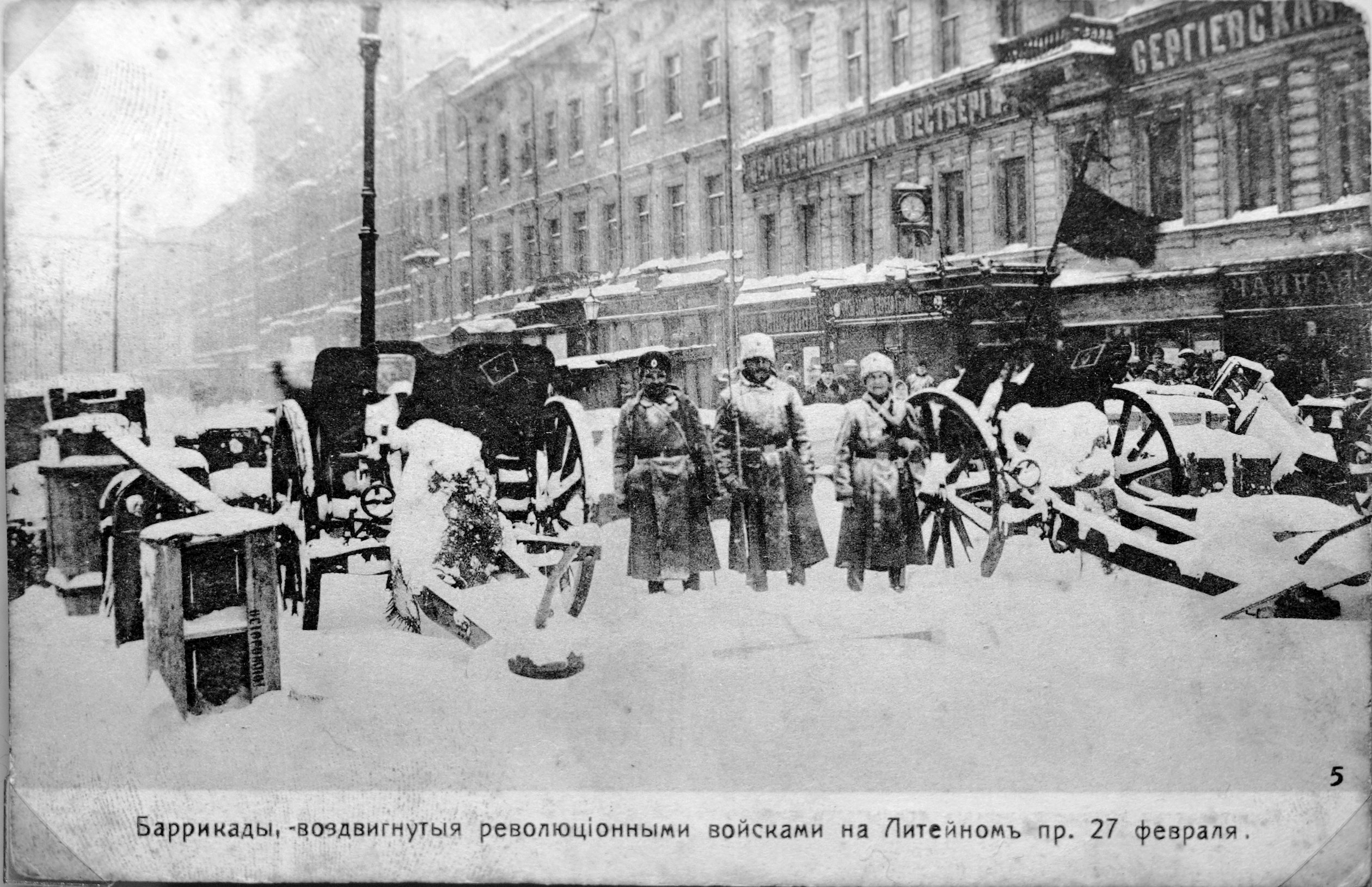 Баррикады на Литейном. На заднем плане аптека Вестберга, на углу с Сергиевской (ныне ул. Чайковского)